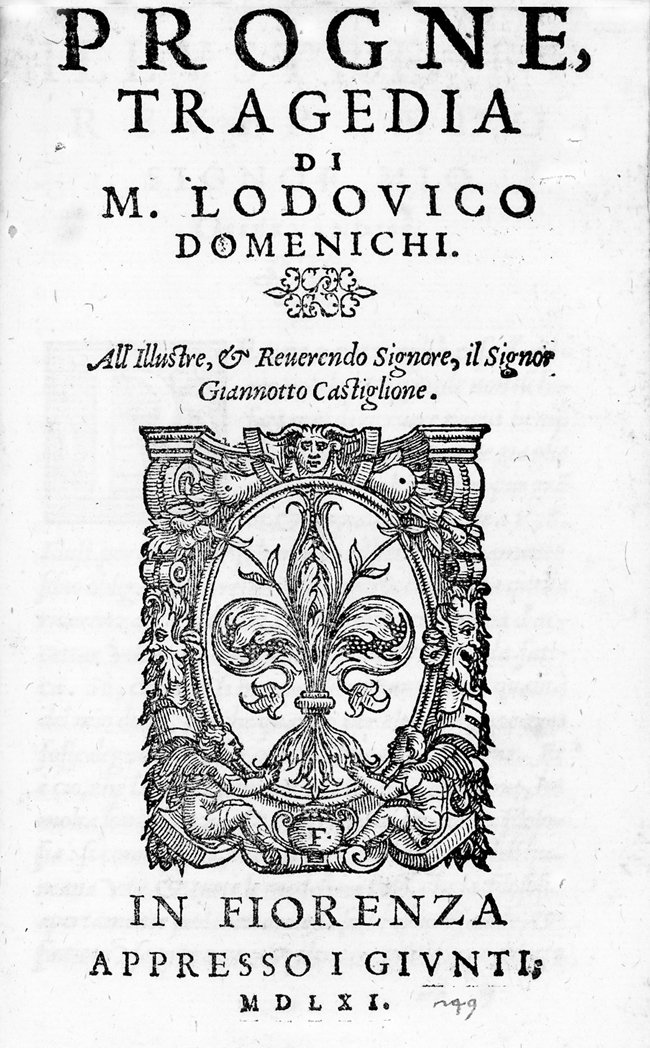 «Progne», tragedia di Lodovico Domenichi, Firenze, Giunti 1561, in-8, pp. 68, 1^ edizione